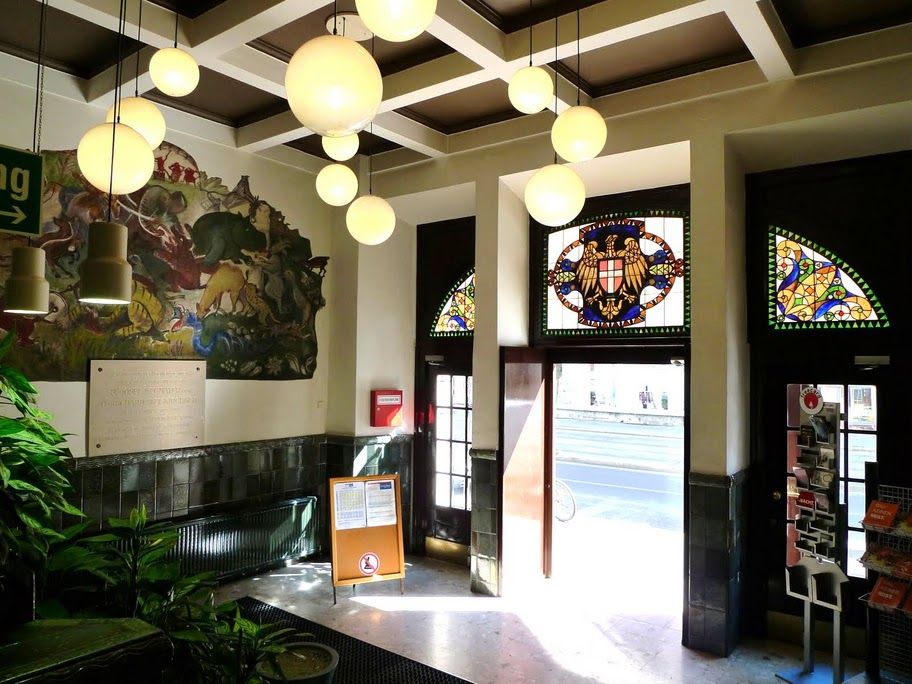 Jörgerbad